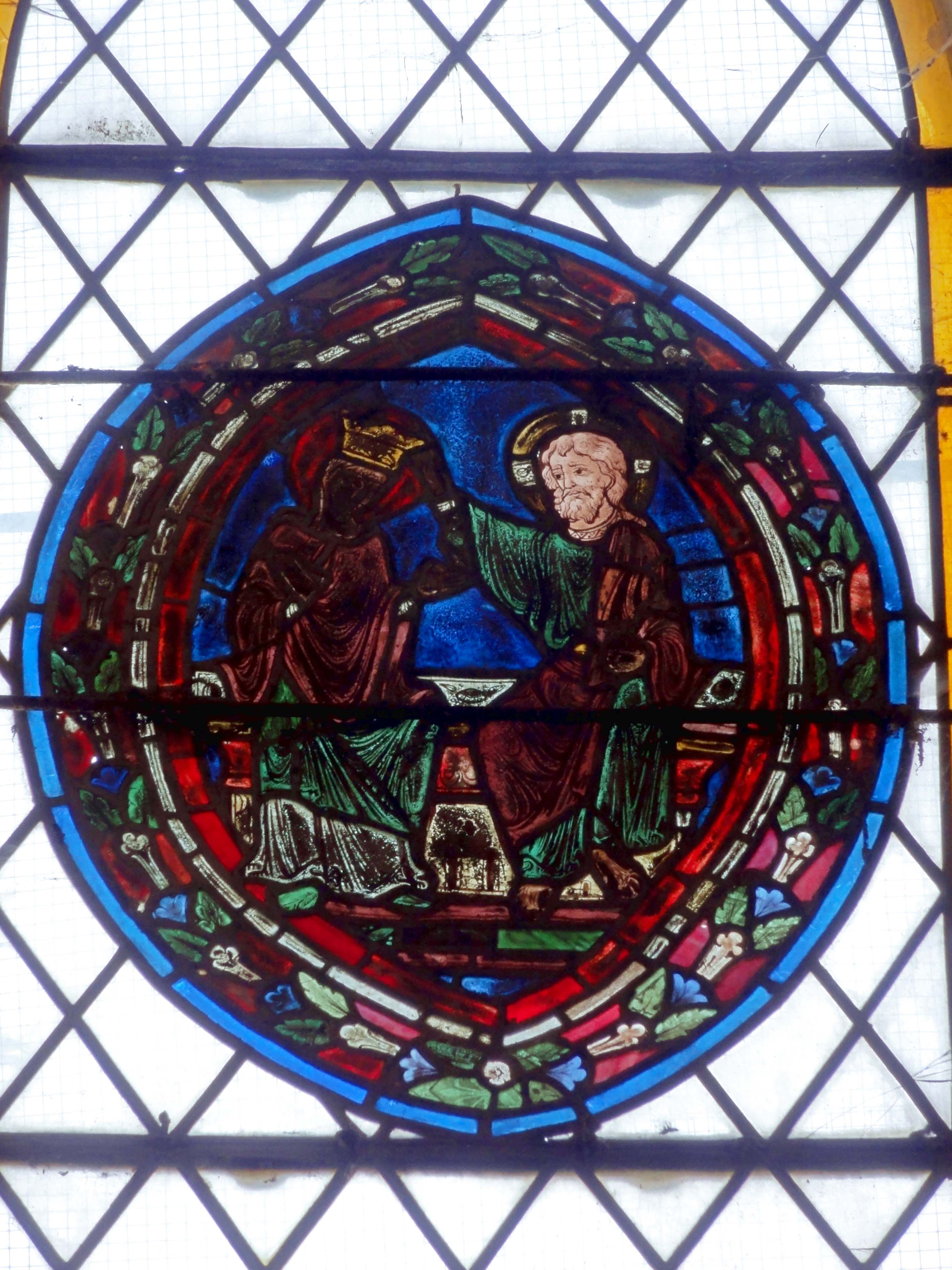 Verrière n° 5, médaillon XIIIe s. - couronnement de la Vierge ; premier quart XIIIe siècle.